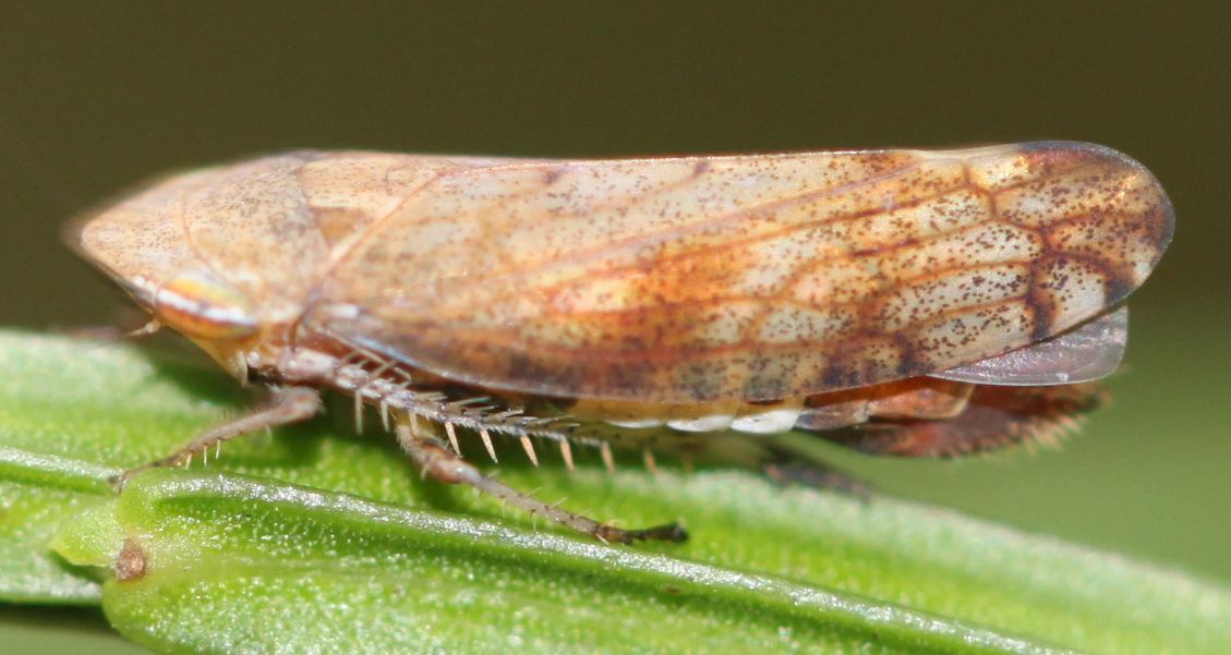 Südliche Strauchzirpe (Fieberiella florii) am 7.10.2016 in der Schwetzinger Hardt